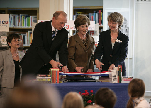 Norbert Claussen, Laura Bush und Heidrun Hamann (Bibliotheksleitern) in der Stadtbibliothek von Schwerin am 6. Juni 2007. Die Präsidentengattin besuchte die Stadt während des G8-Gipfels in Heiligendamm.